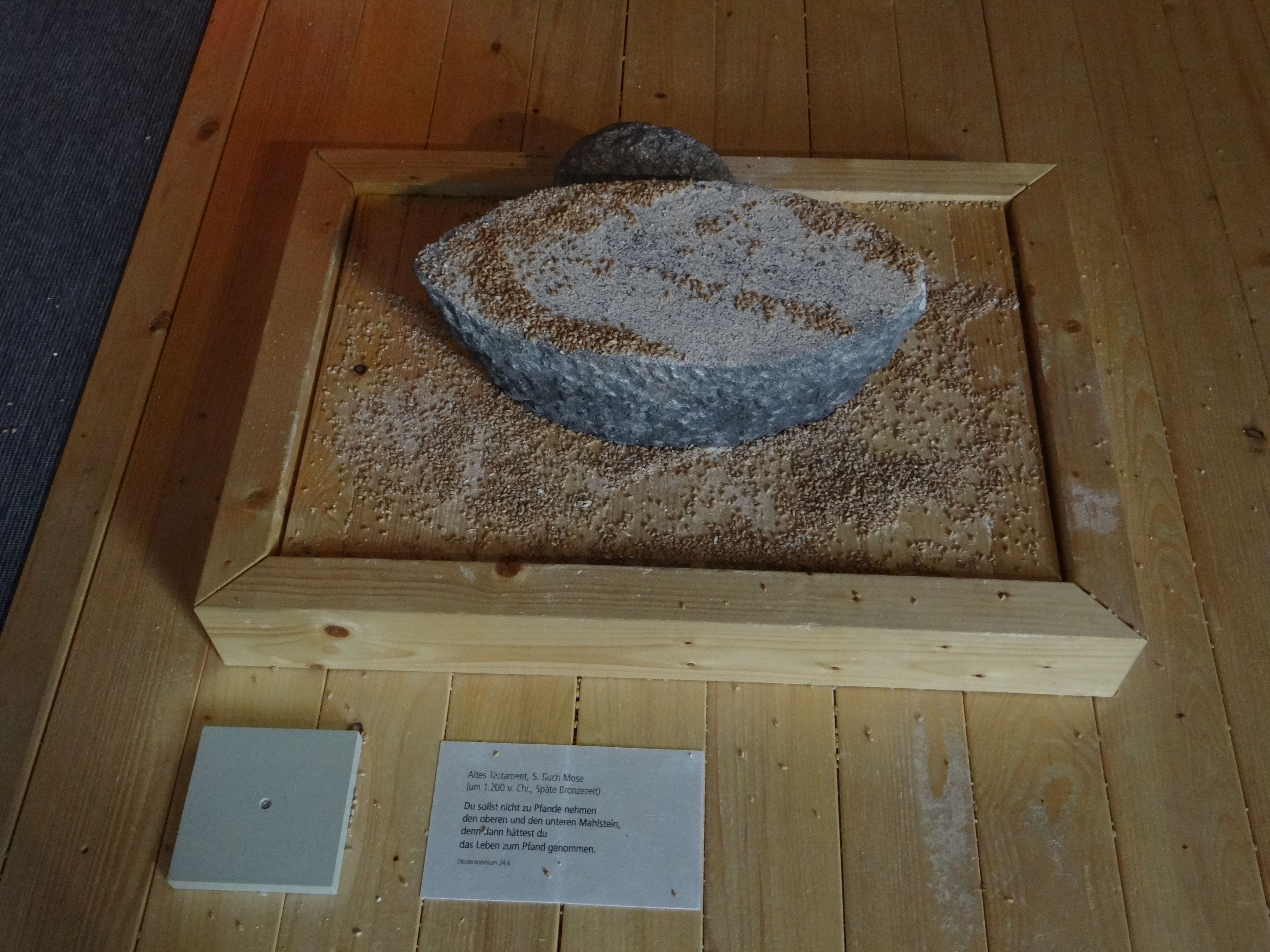 Reibstein aus Mayener Basaltlava, Demonstration im Informationszentrum Terra Vulcania in Mayen